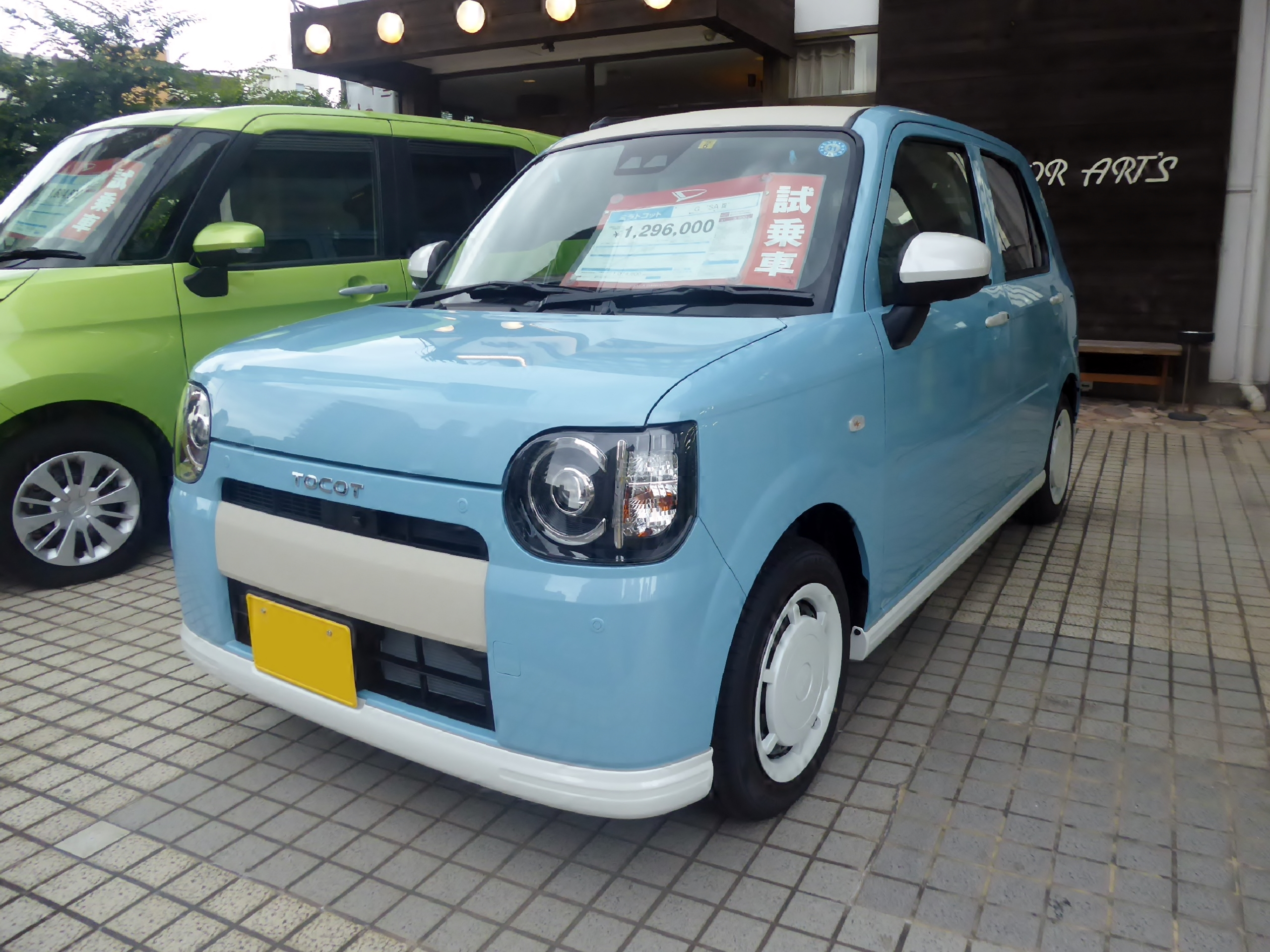 DBA-LA550S-GBVF型ダイハツ・ミラトコットG"SA III"をフロントから撮影。